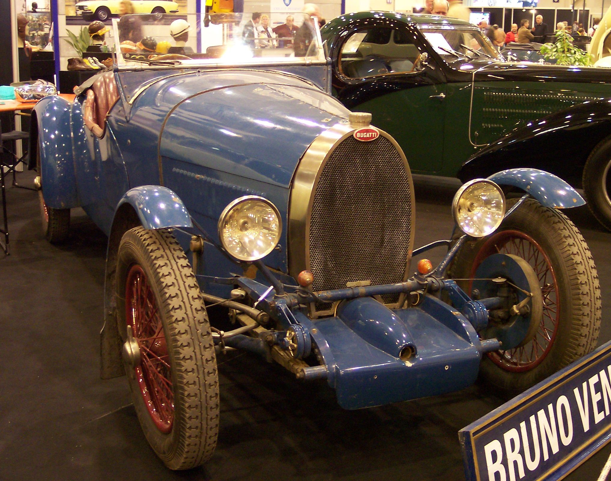 Bugatti T38 1928